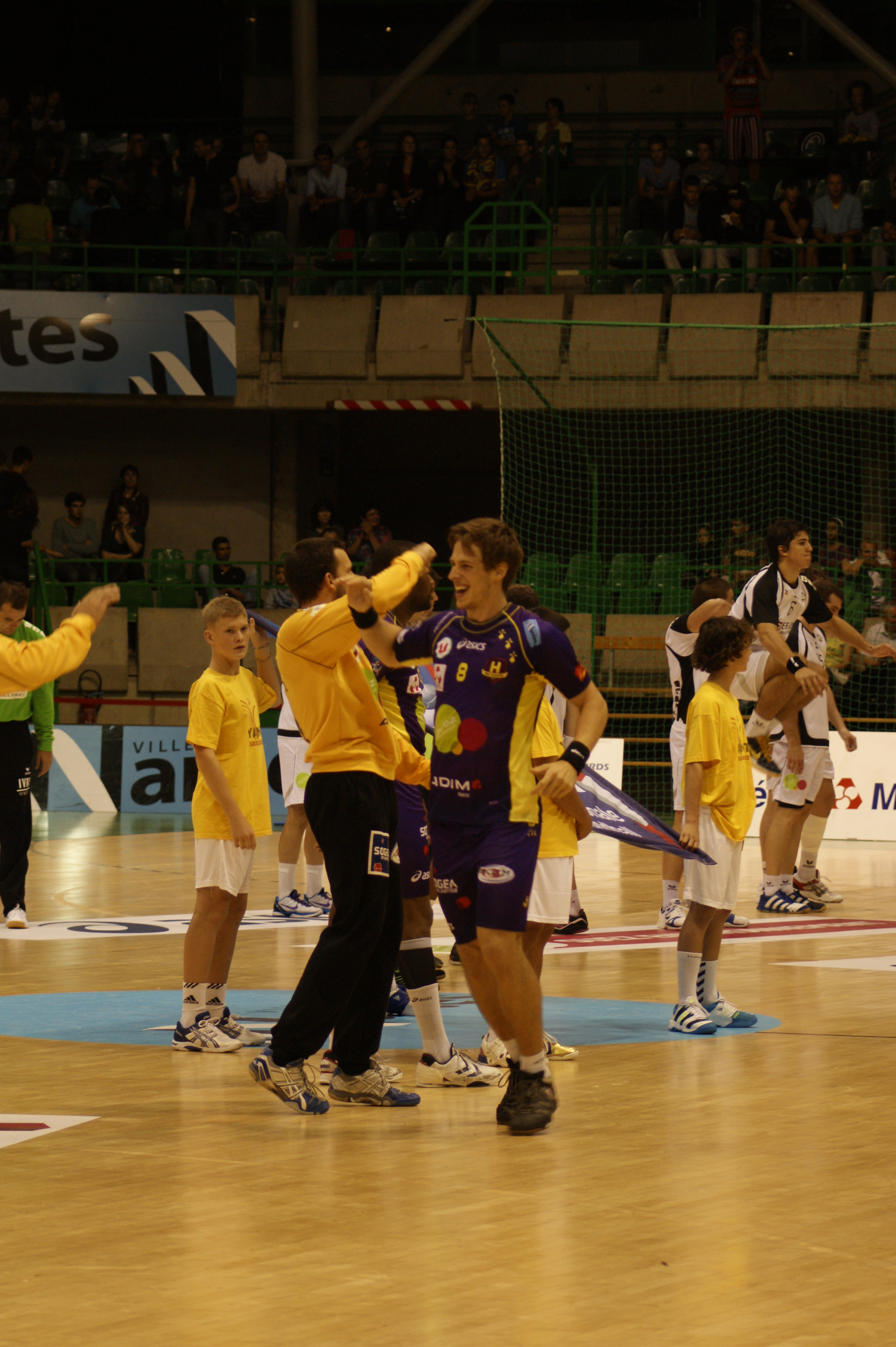 Kim Ekdahl du Rietz ici au Palais des Sports de Beaulieu lors de son passage à Nantes pour la saison 2011-2012